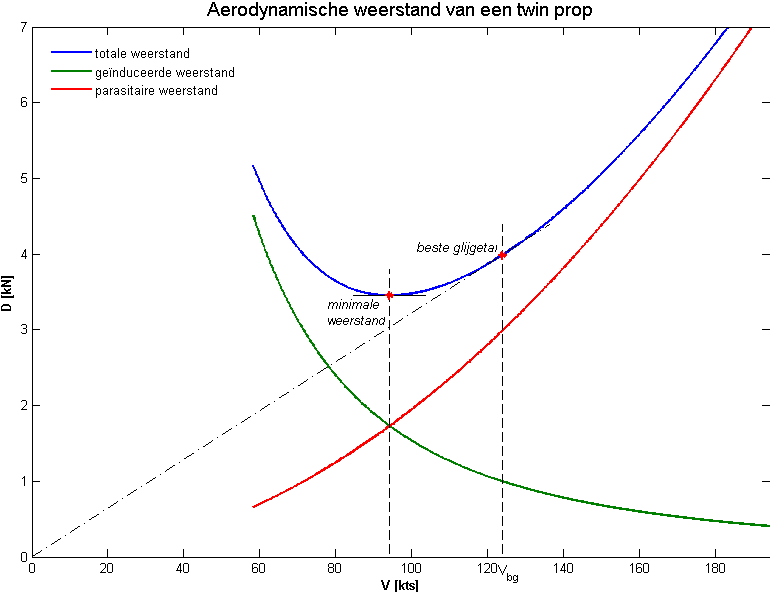 Aerodynamische weerstanden